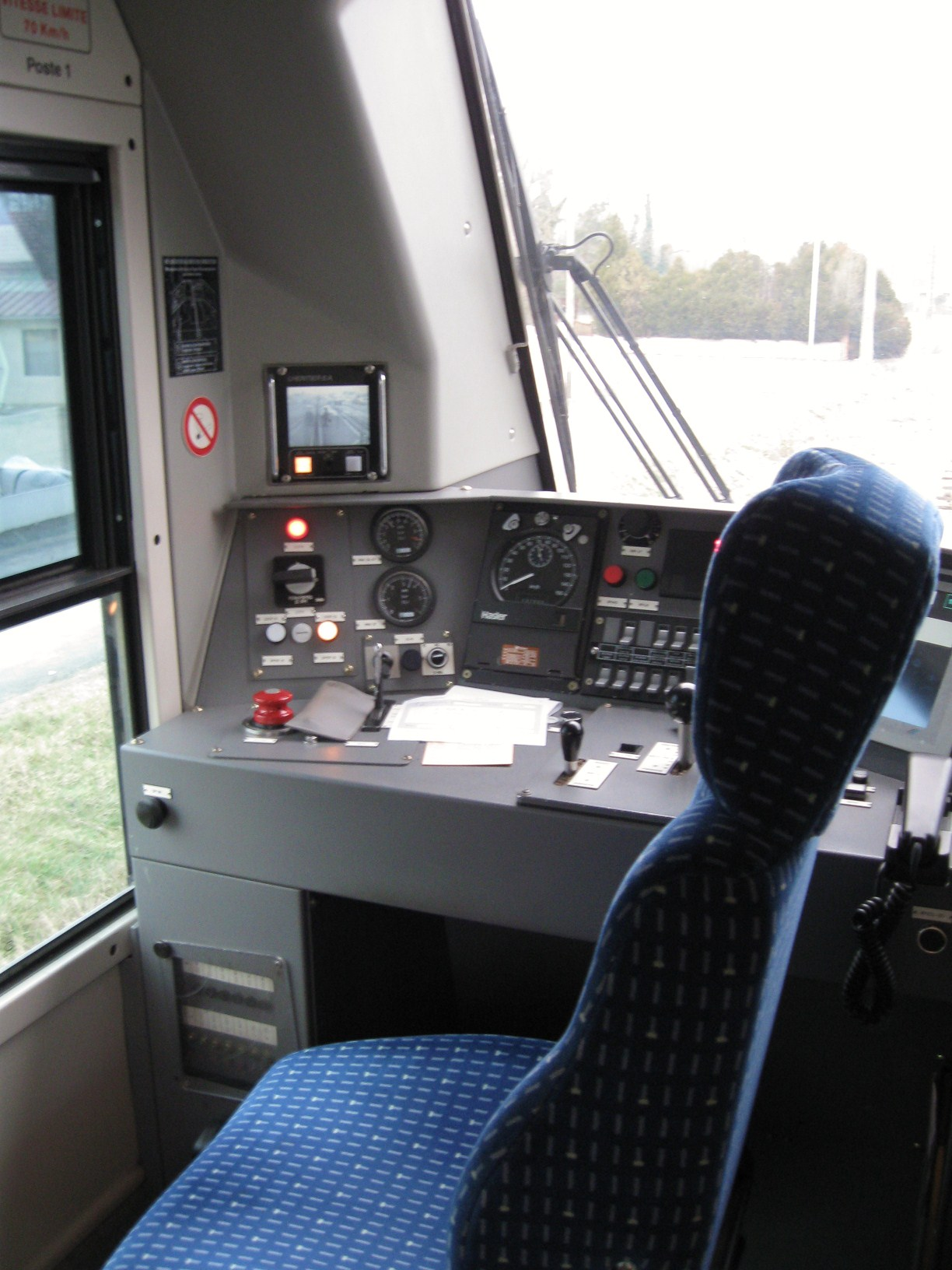 Cabine de conduite de l'autorail X 74505 du chemin de fer à voie métrique du Blanc-Argent